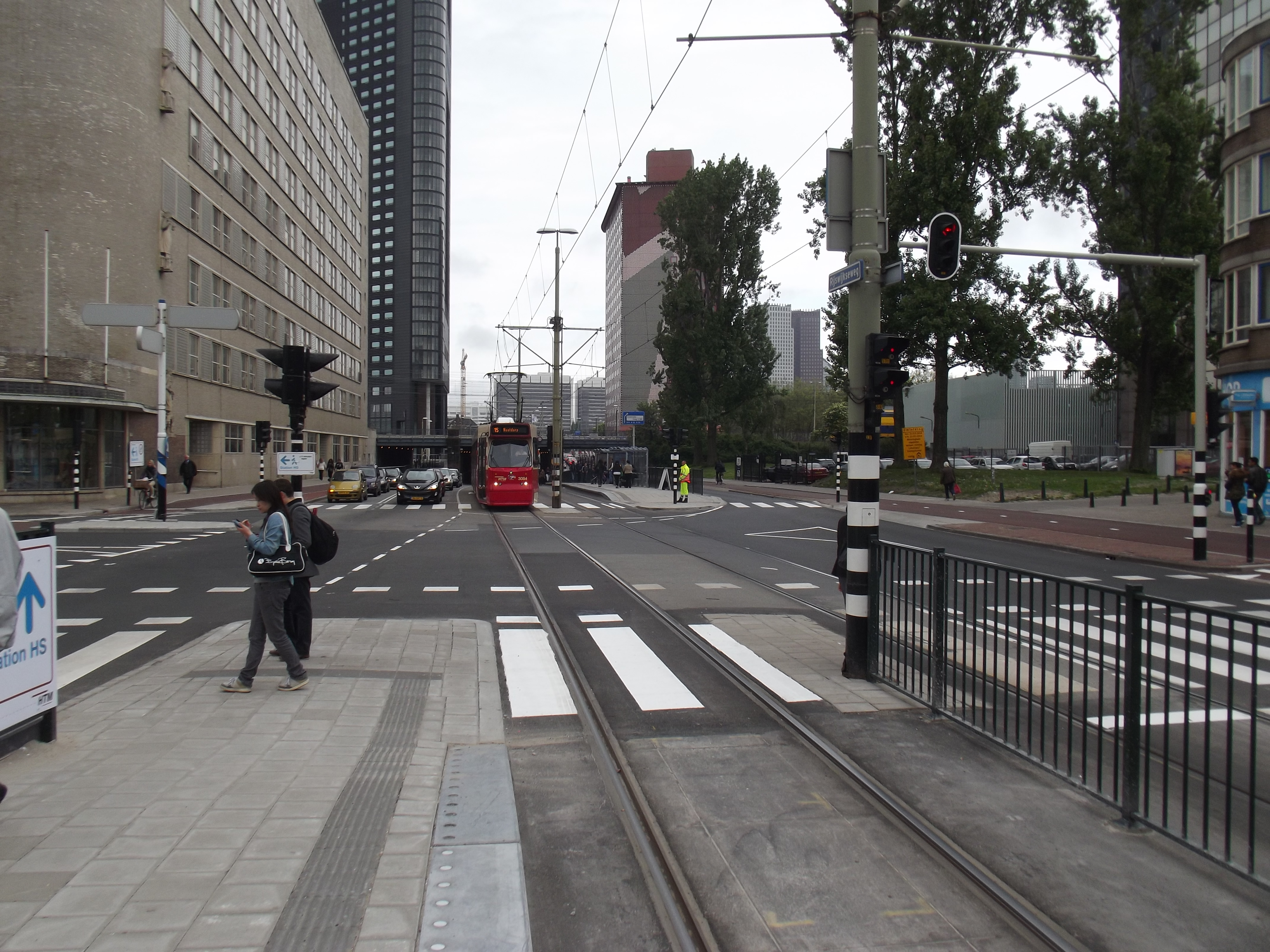 Nieuwe HTM halte op de Rijswijkseweg ter hoogte van de Waldorpstraat ter vervanging van de halte op de Rijswijkse plein